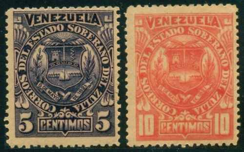 Las estampillas incirculadas de estado soberano del Zulia, la cuales fueron mandadas a imprimir por el general Rafael Parra el 24 de febrero de 1915 en la Hormer Lee Bank Note Company de Nueva York y que jamás circularon porque el gobierno nacional lo inpidió.